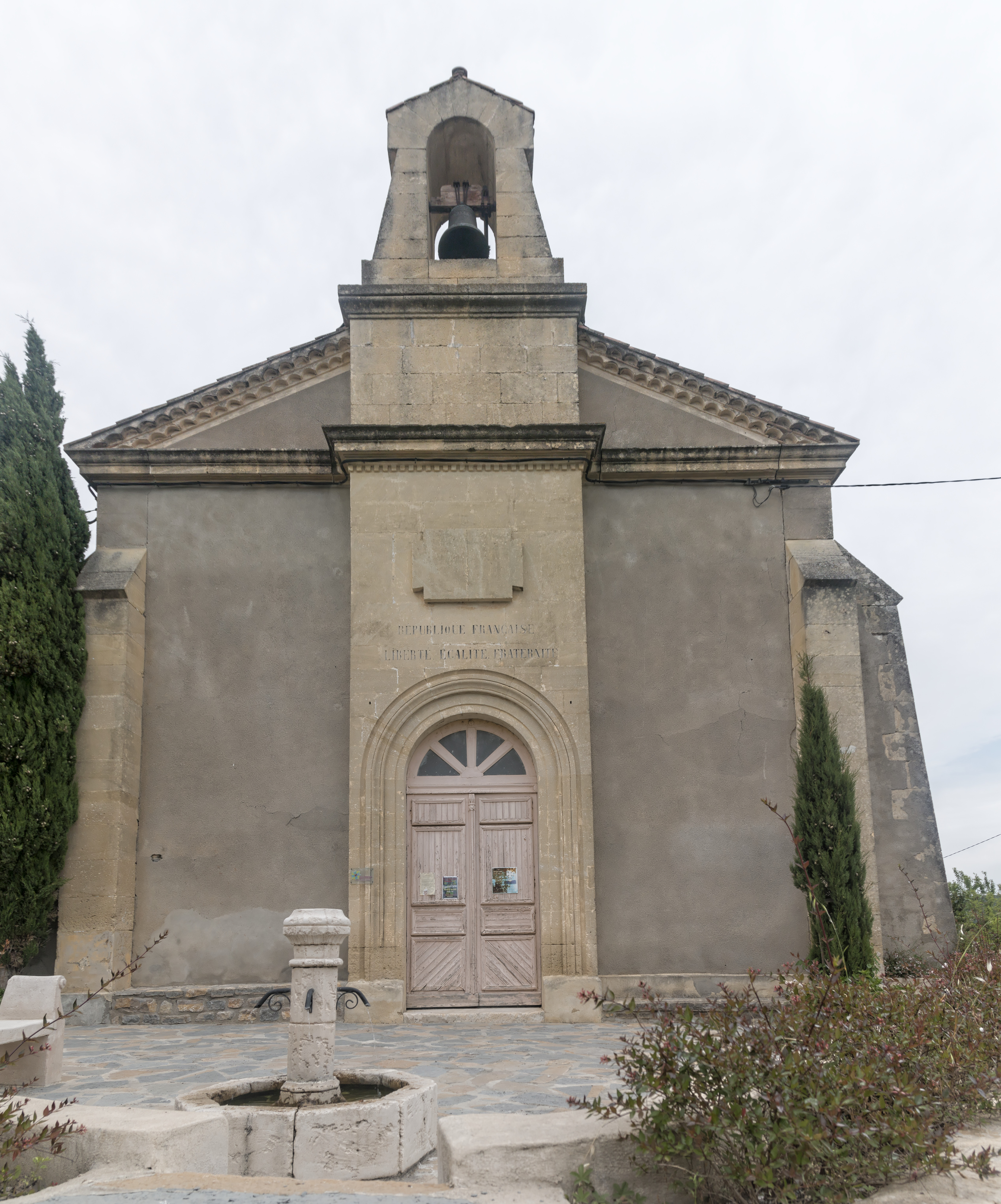 Cannes et Clairan protestant church